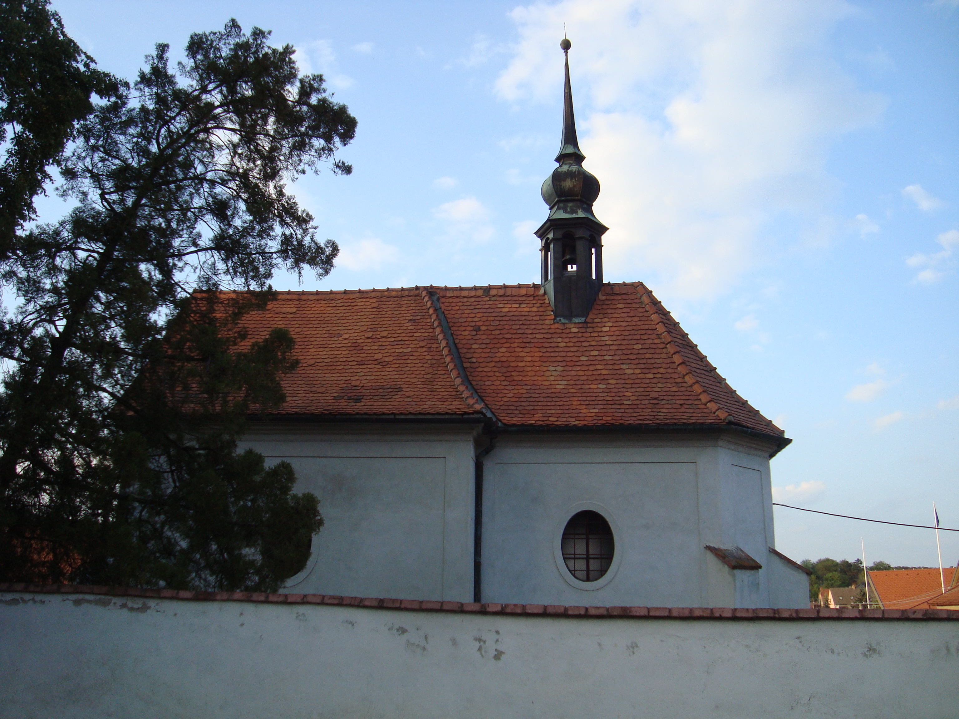 Kostel svatého Šimona a Judy, Radostice